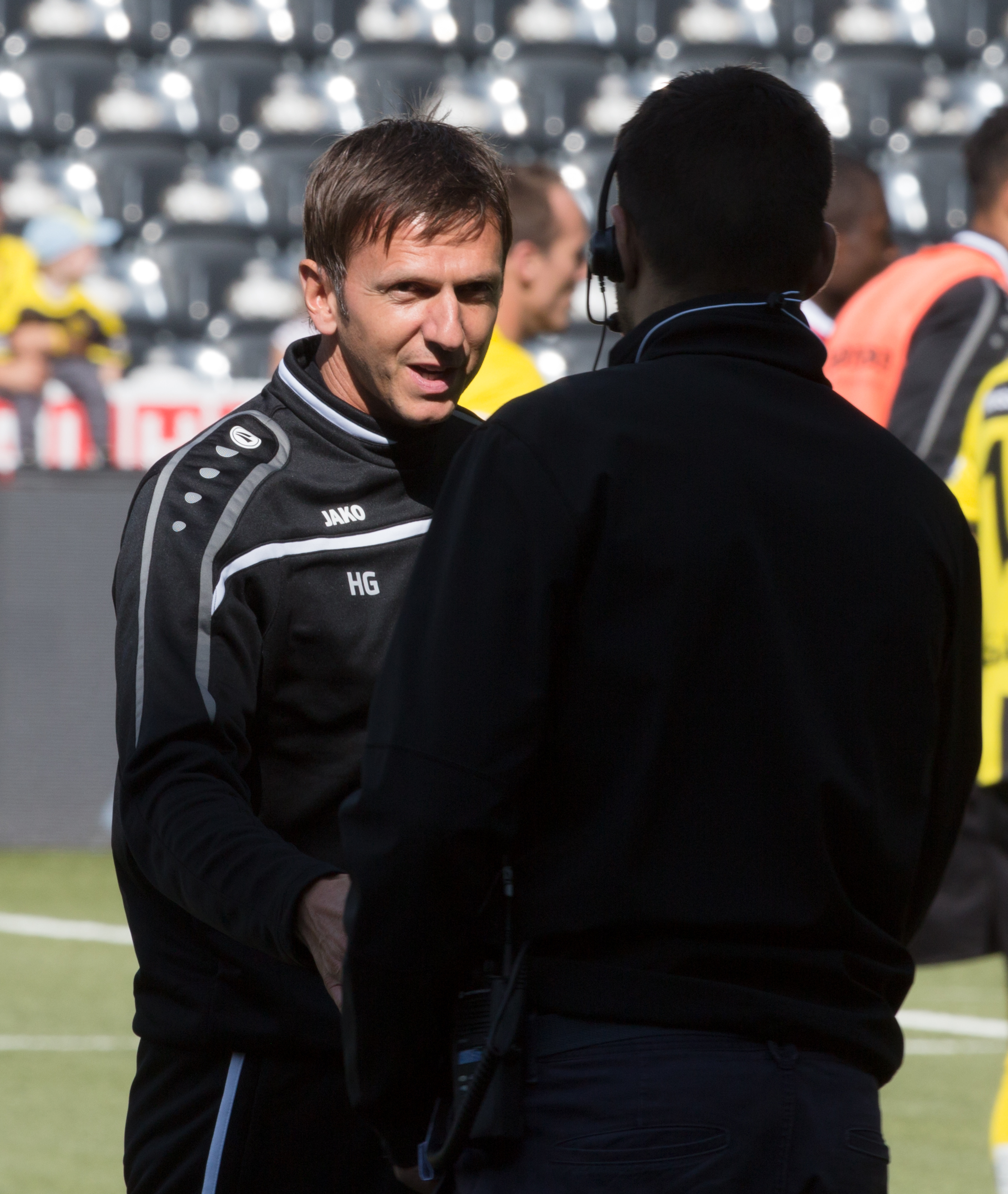 Harald Gämperle beim Spiel des BSC Young Boys gegen den FC Luzern